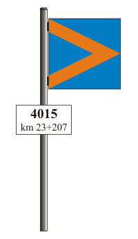 Segnali Ferroviari